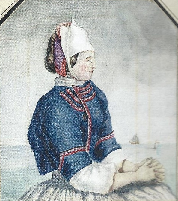 Félix Marant-Boissavant : Jeune fille à la pointe de Penmarc'h (costume de Pont-l'Abbé) (milieu XIXe siècle)